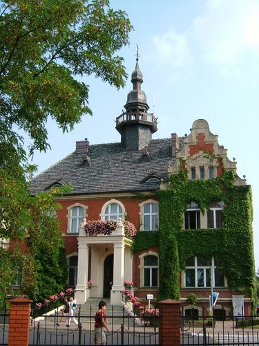 Obecny ratusz w Opalenicy, zbudowany w 1897 r.